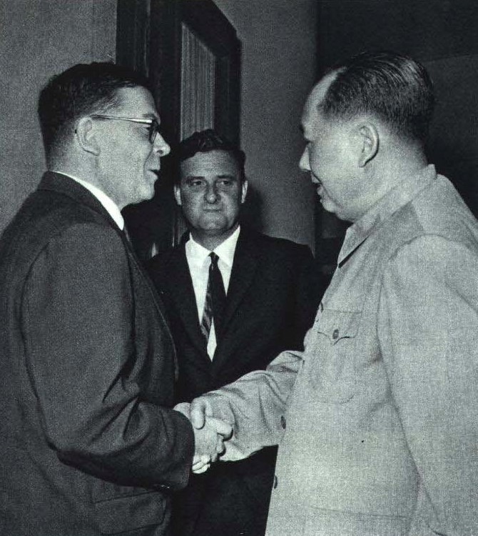 1964-06 1964年 澳大利亚共产党主席希尔和奥克访问中国